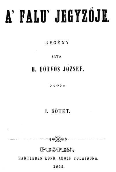 A falu jegyzője című regény első kiadásának címlapja.